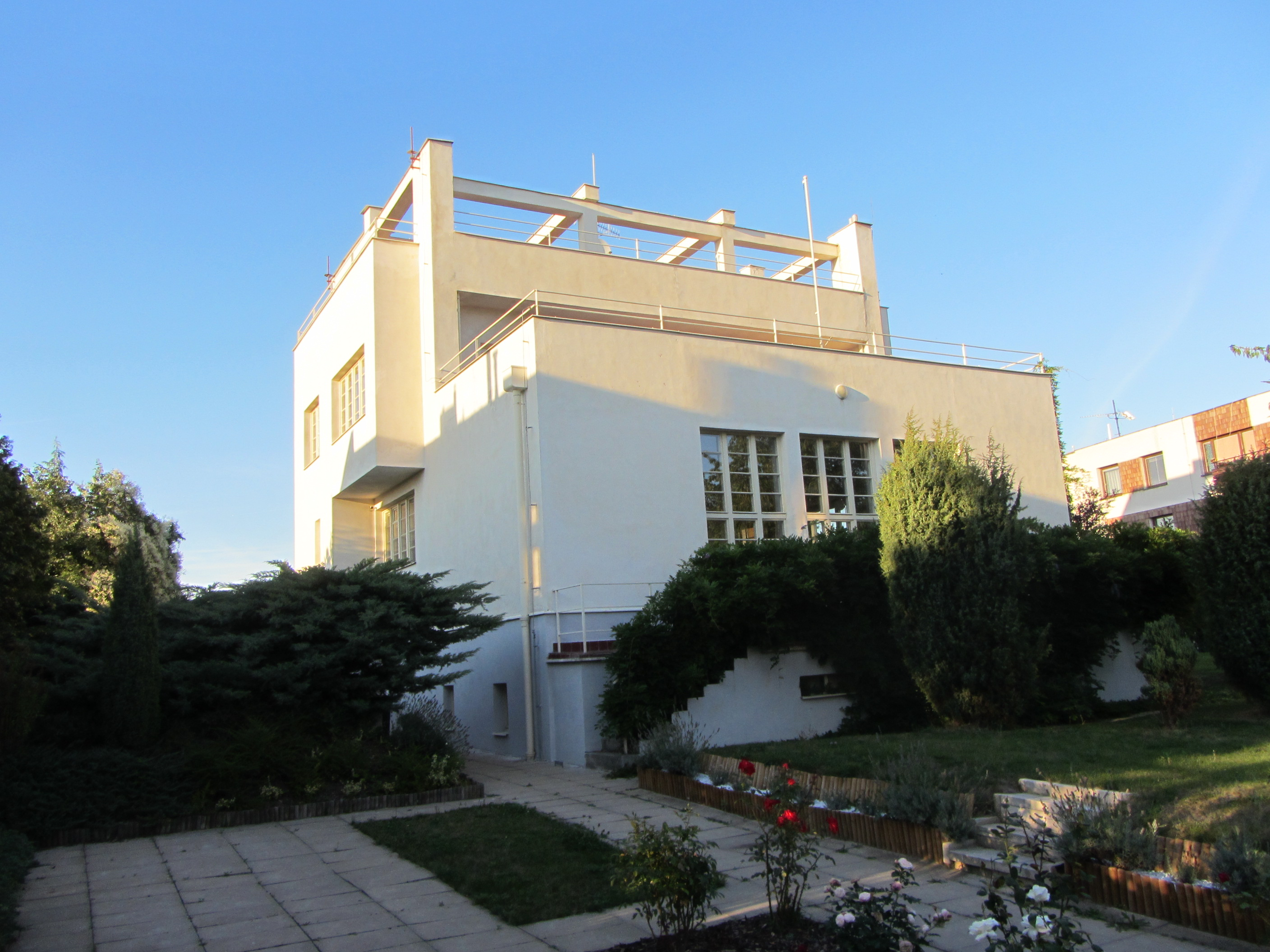 Vila (Smíchov), Praha 5, Na Cihlářce 2092/10, Smíchov